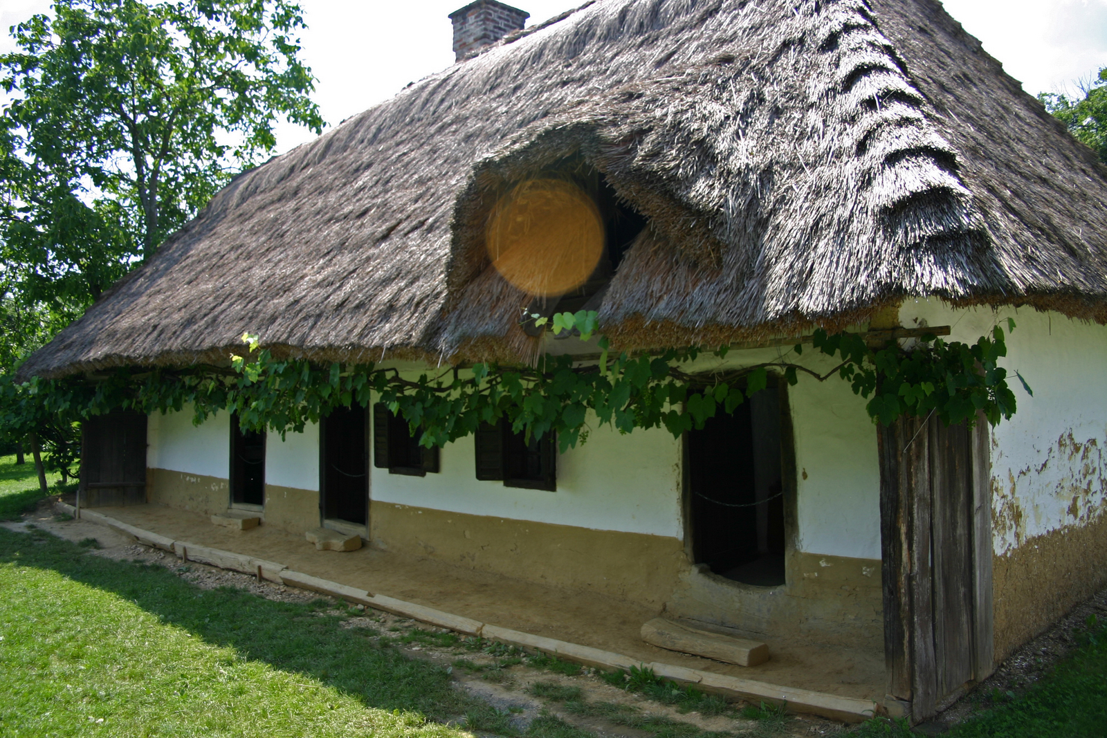 Szalafő, Hungary